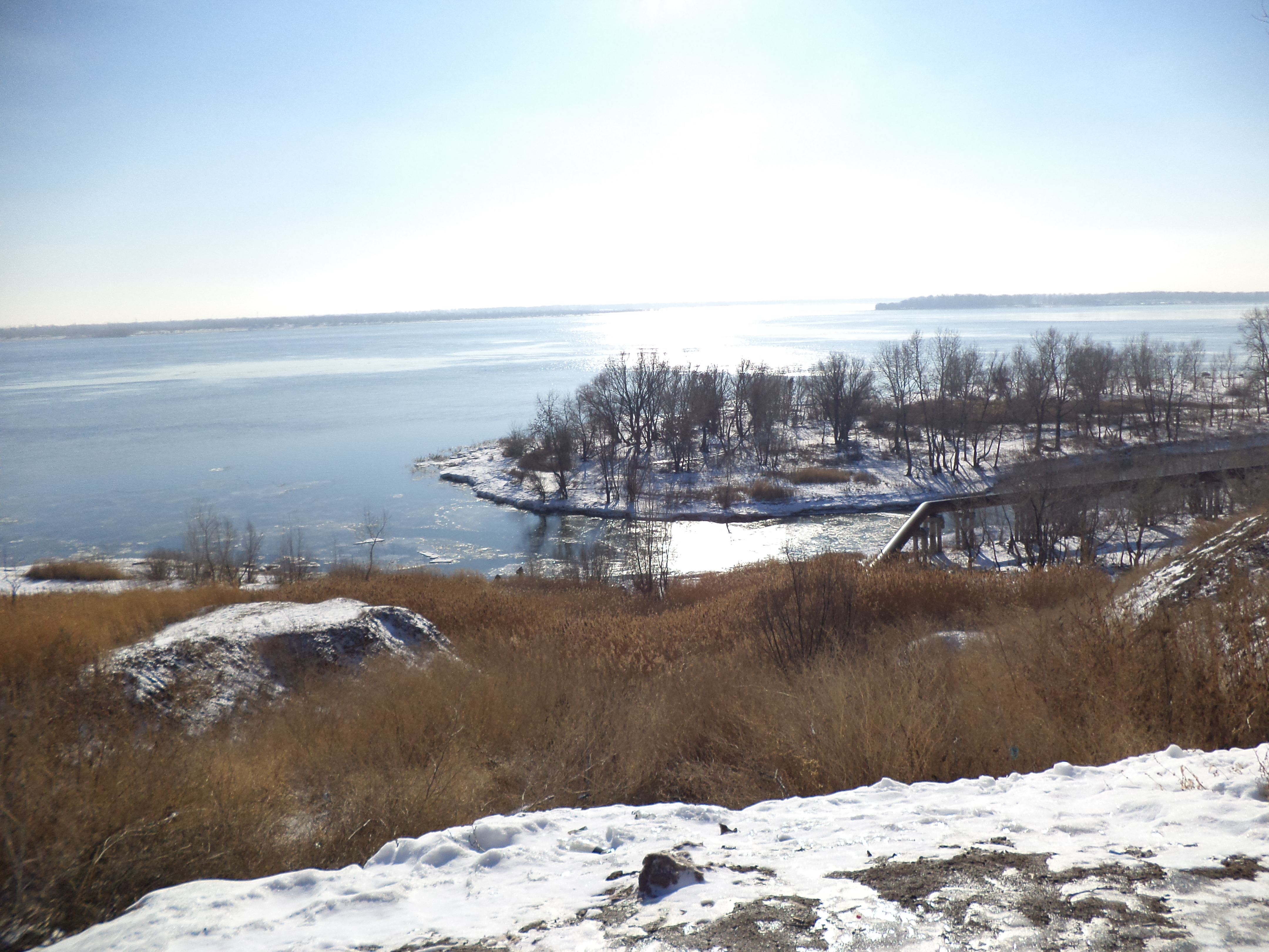 Устье Мокрой Мечётки 25 января 2013